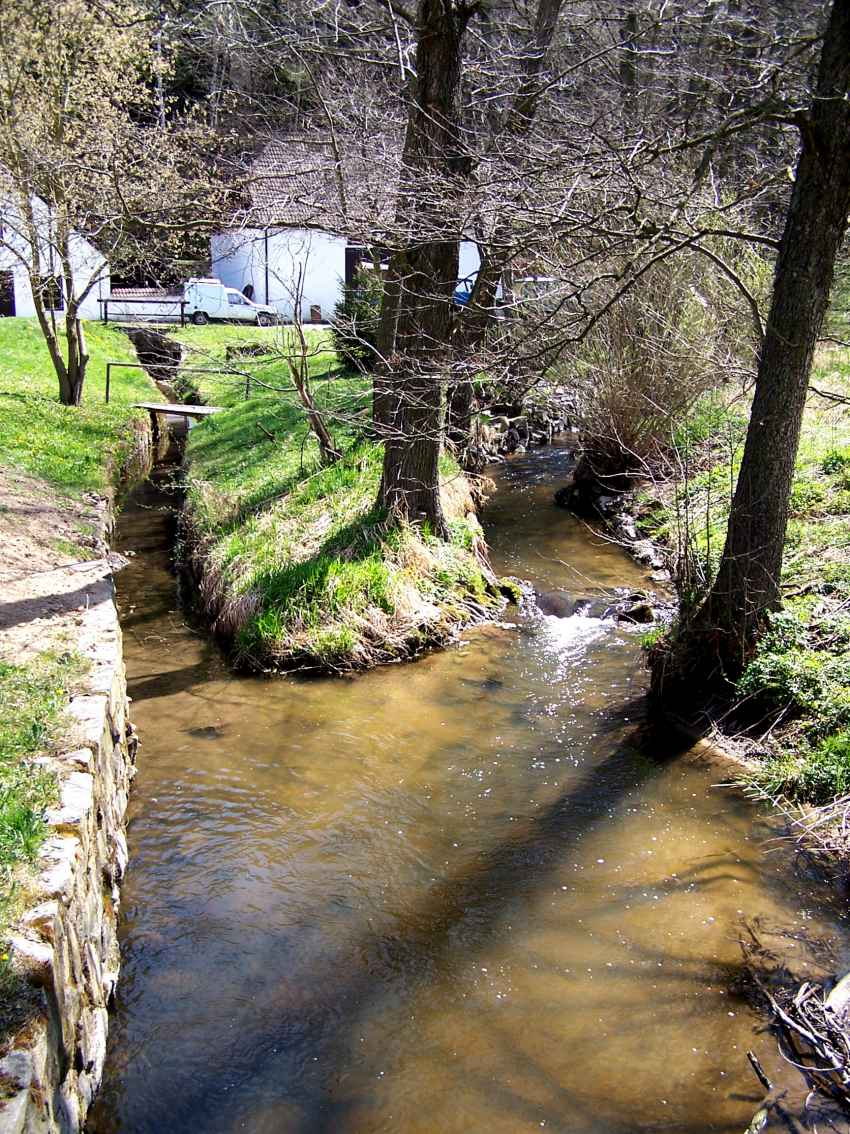 Buškův hamr